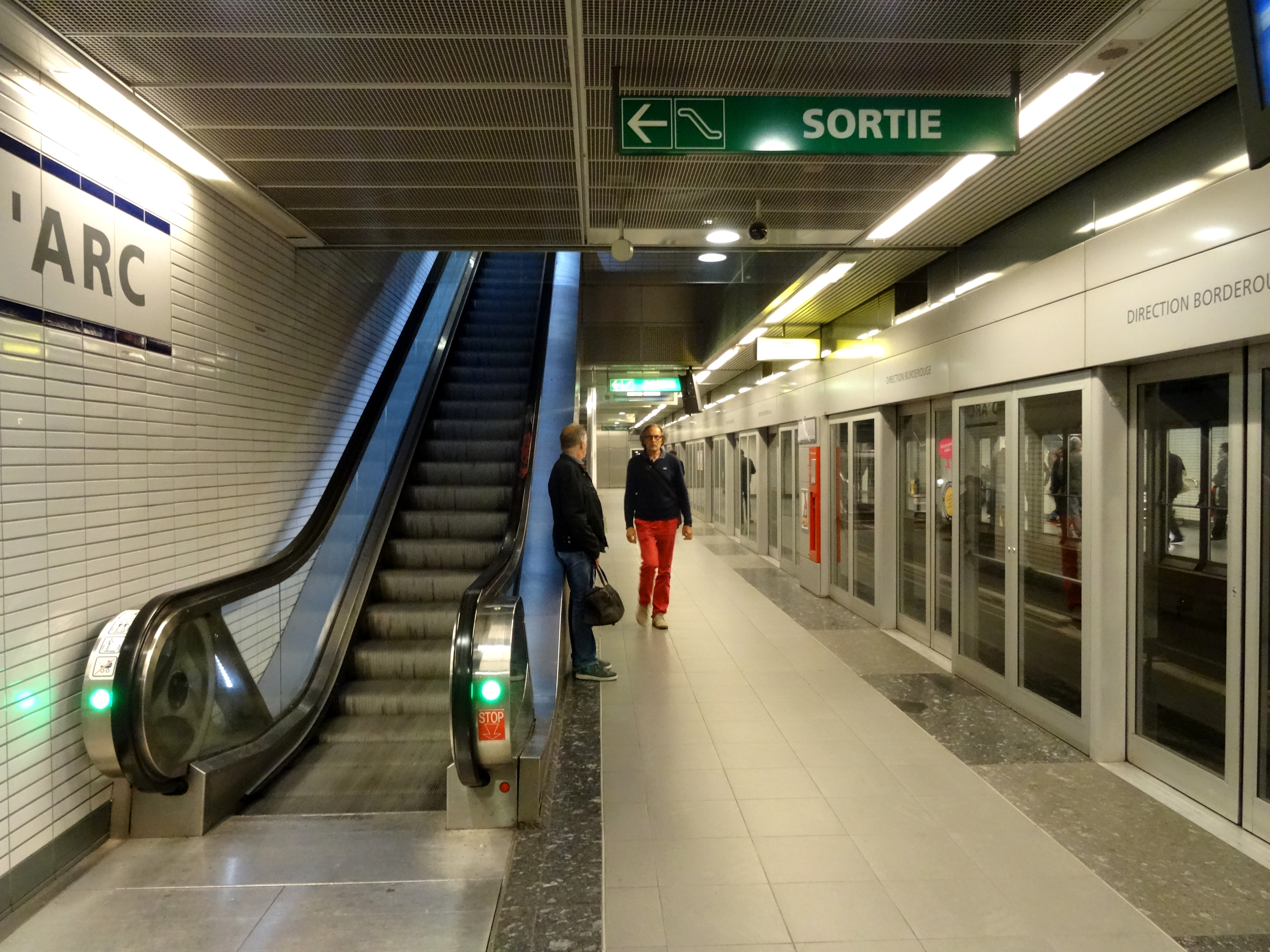 Ligne B